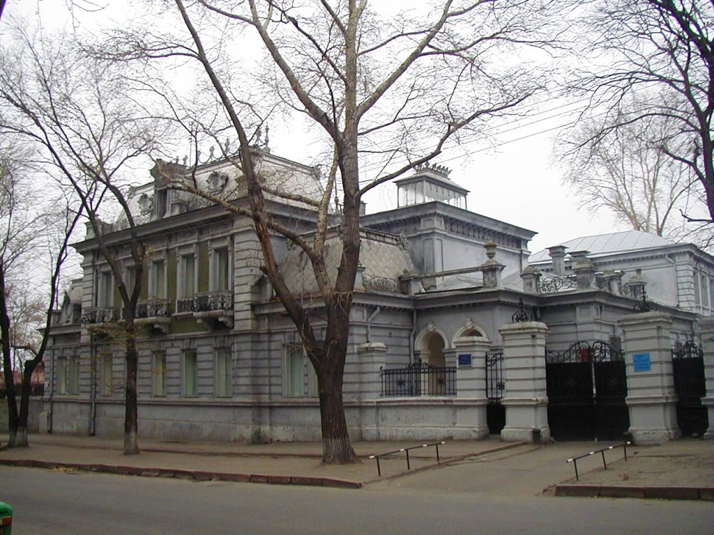 Симбирск. Особняк купца А.А. Сачкова Архитектор А.А. Шодэ 1909 г.